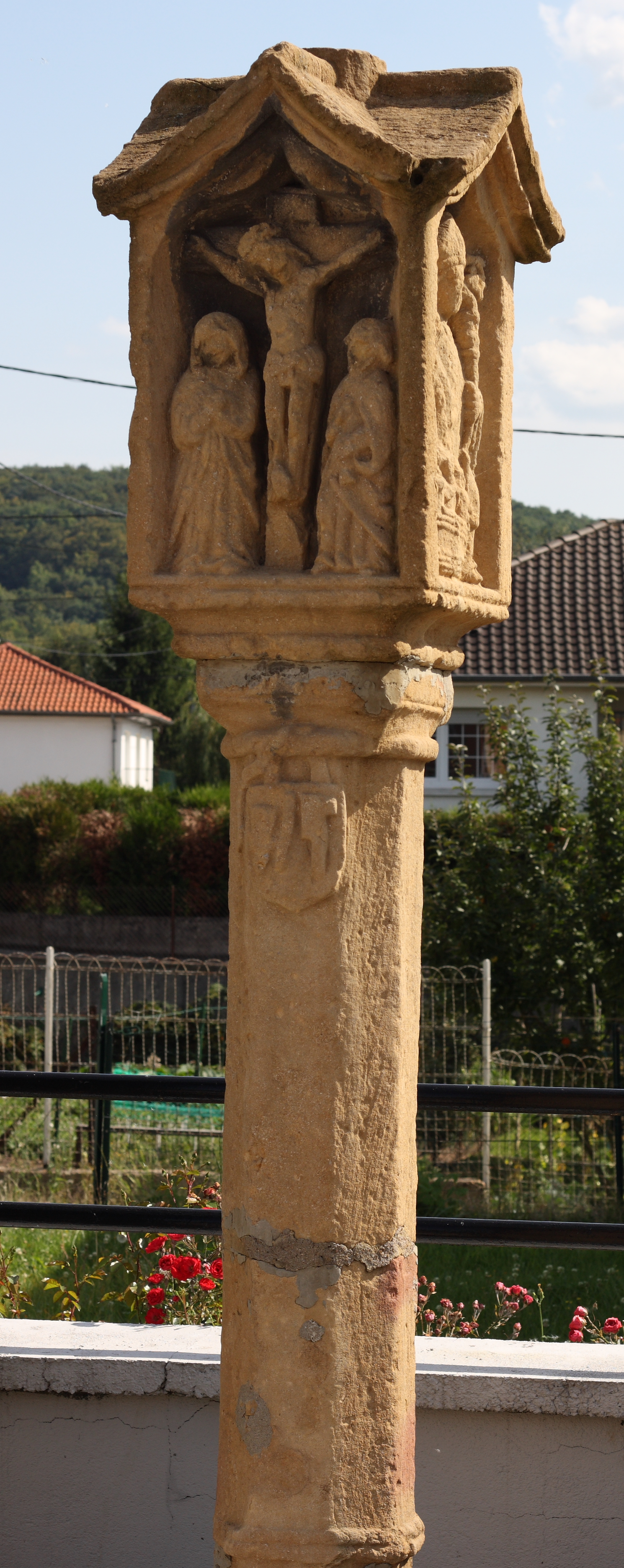 Croix de Chemin in Koenigsmacker (siehe [1])